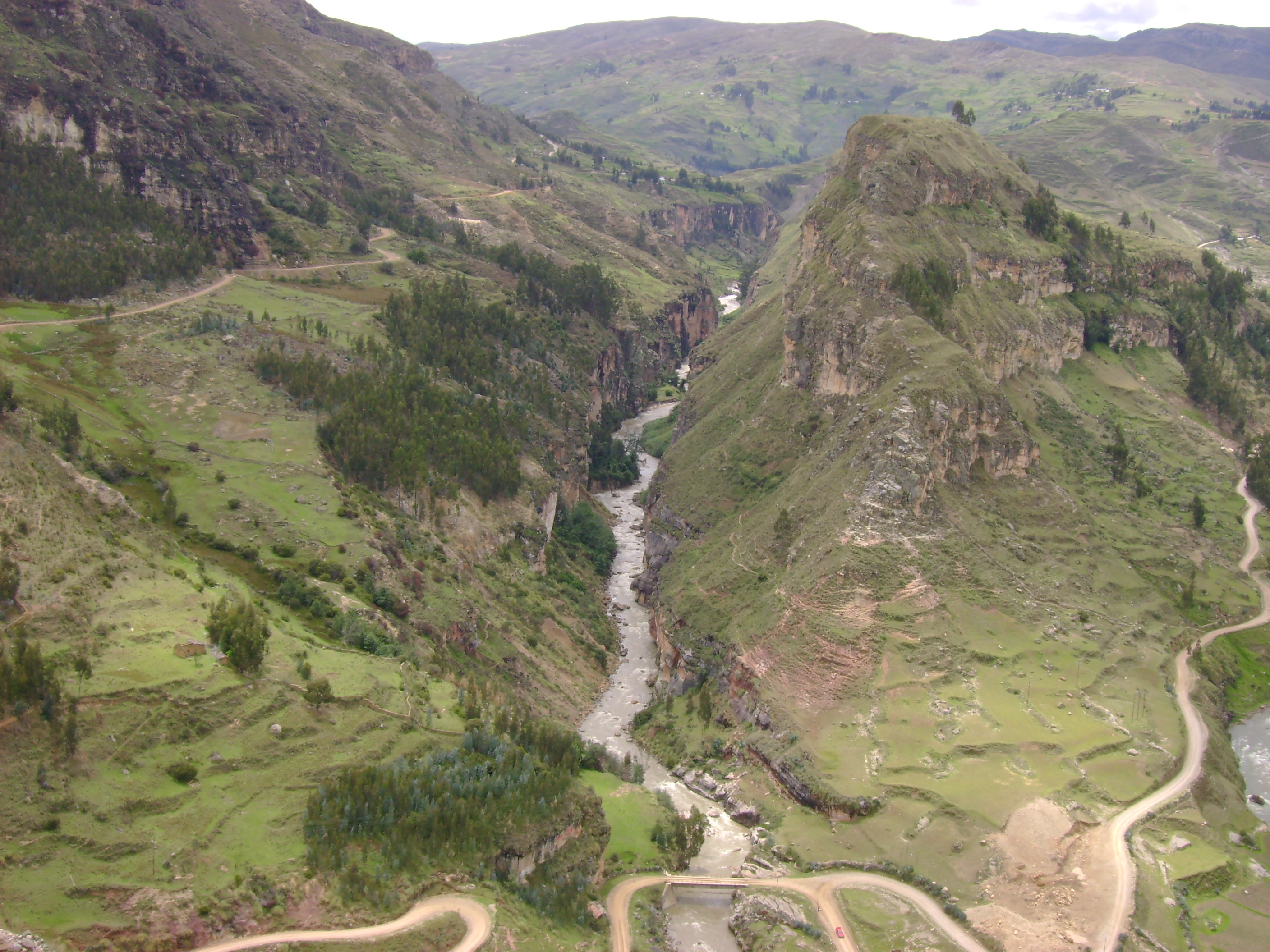 Río Lauricocha desde el mirador de Rondos.